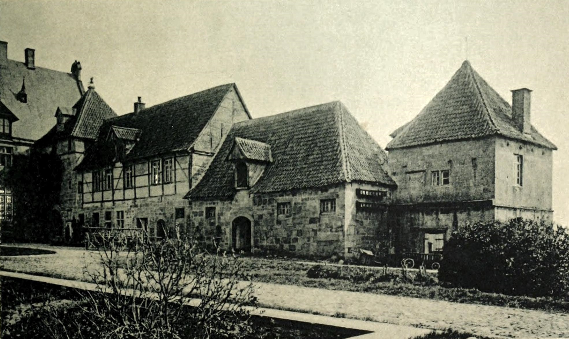 Haus Havixbeck im Münsterland, Ostflügel der Kernburg